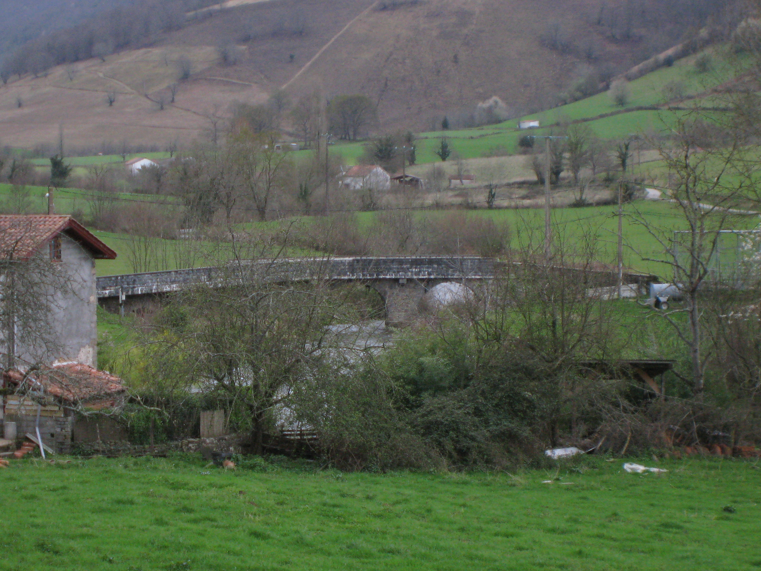 Pont à Saint-Just-Ibarre (Soule) (Pyrénées-Atlantiques) (Pyrénées).